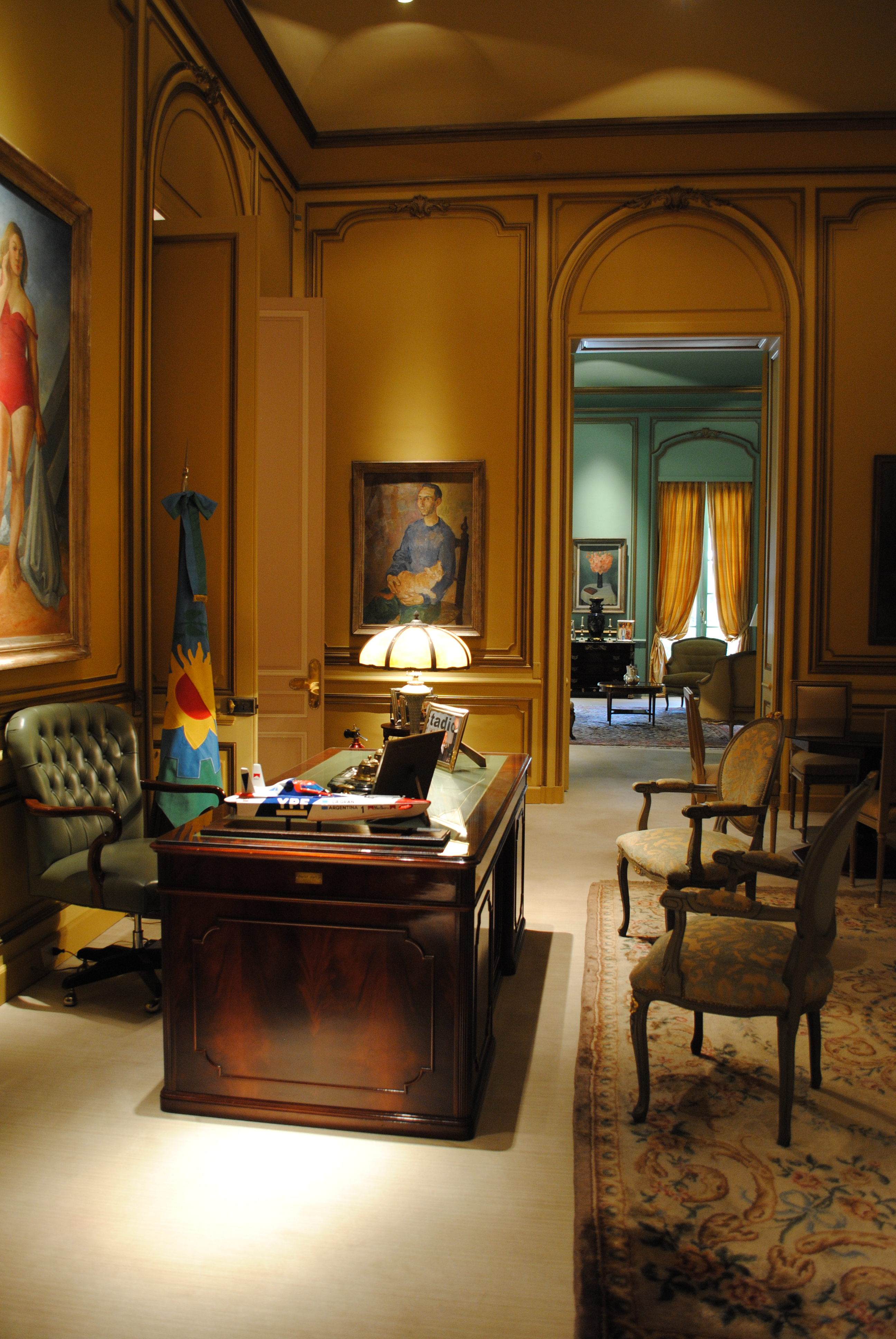 Casa de Gobierno de Buenos Aires y Residencia del Gobernador